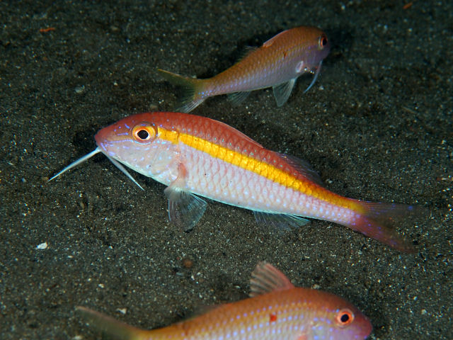 ウミヒゴイ Parupeneus chrysopleuron